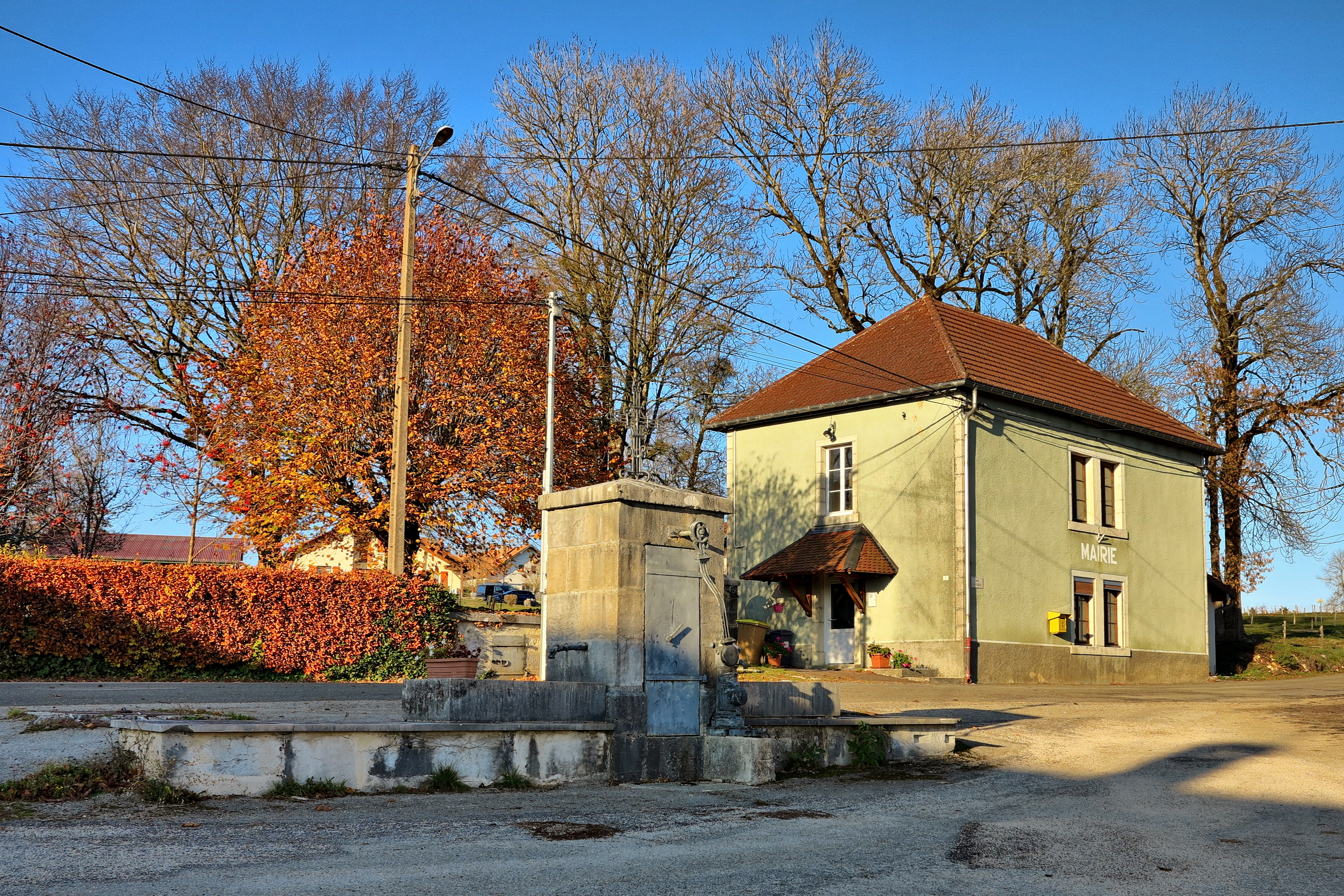 La fontaine et la mairie